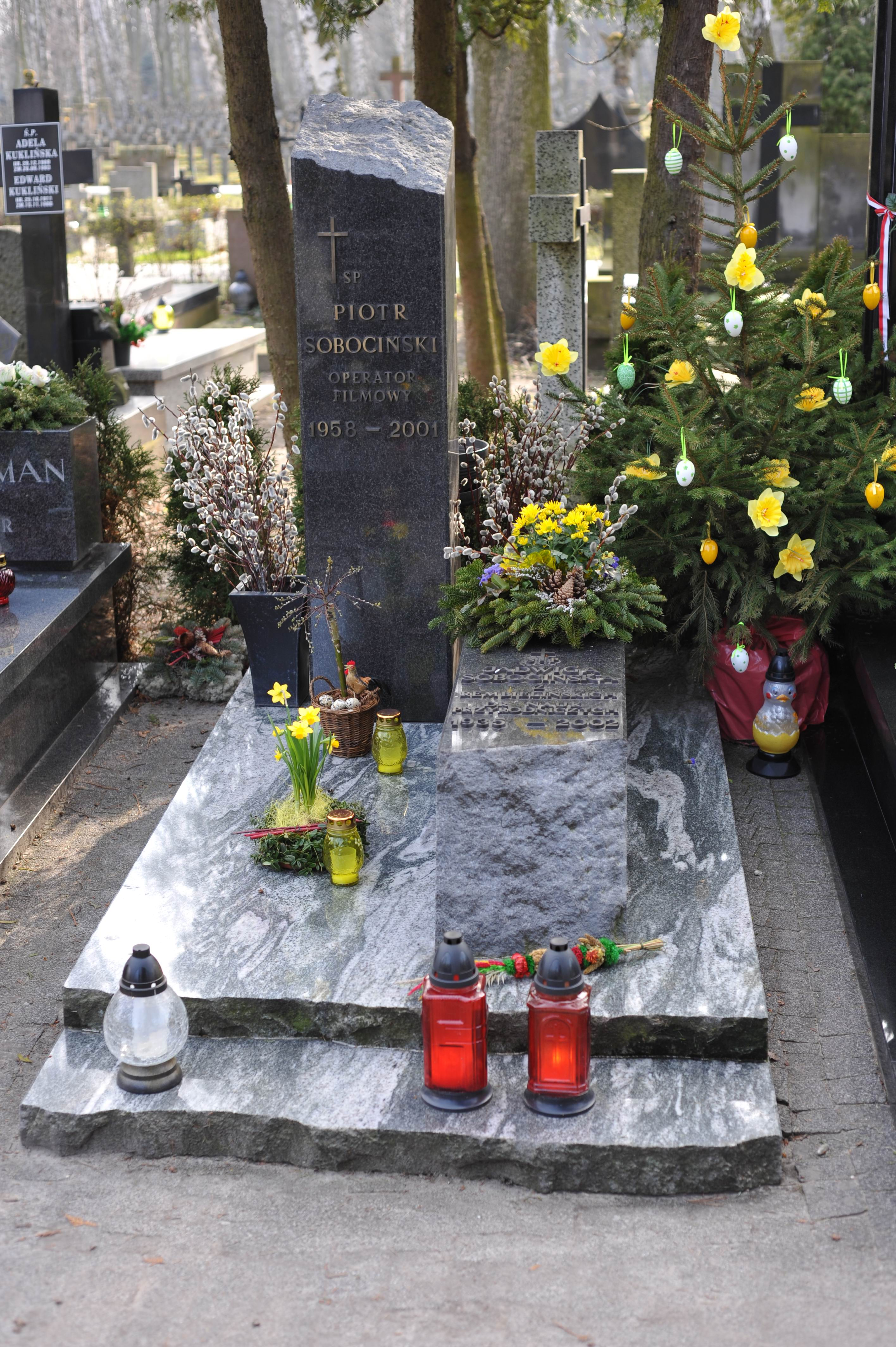 == Licencja: ==